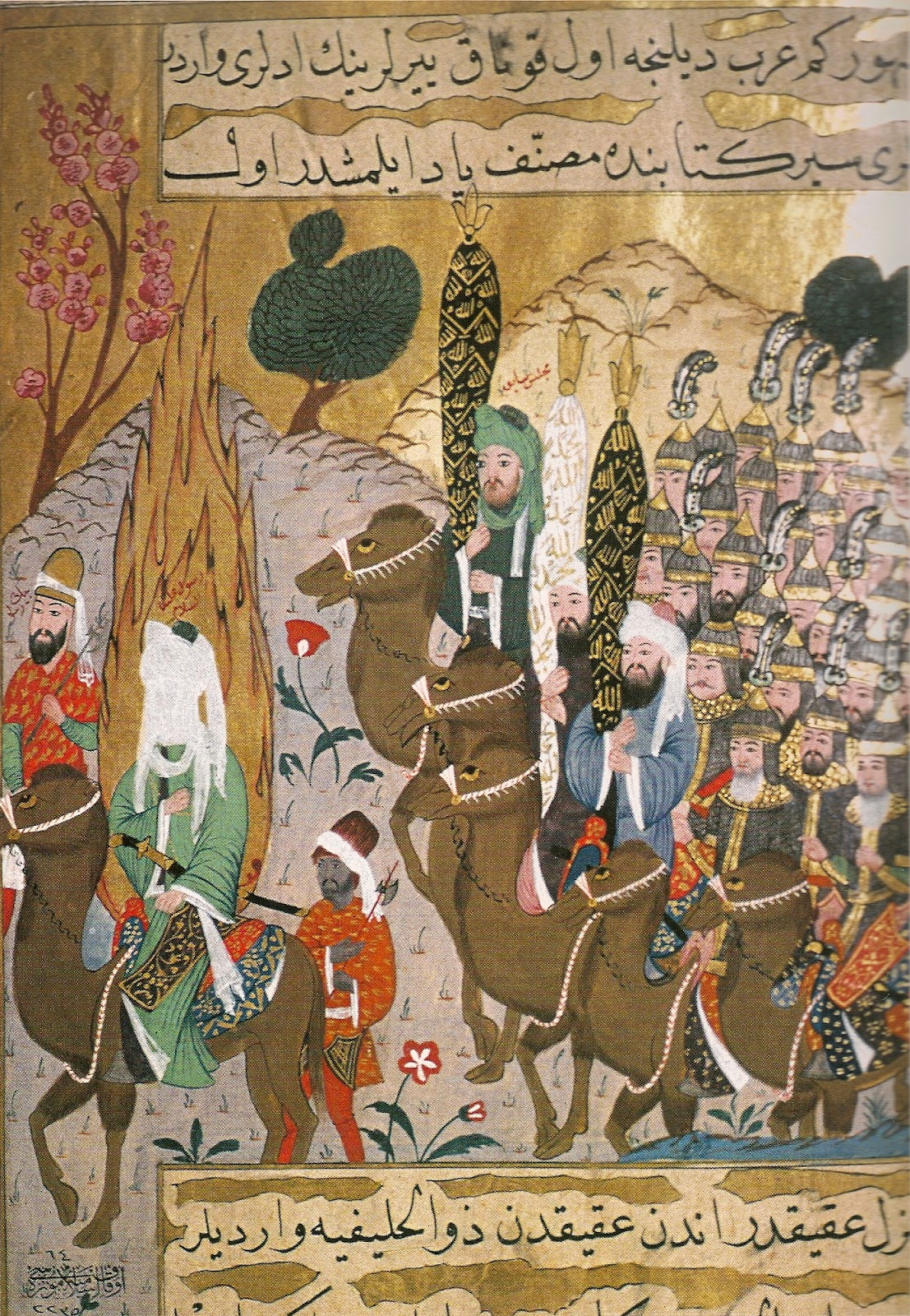 Mahoma Y Sus Seguidores, Parten Hacia La Meca.- Miniatura Del Siyer-i Nabi. Estambul ,segunda Mitad Del S.XVI